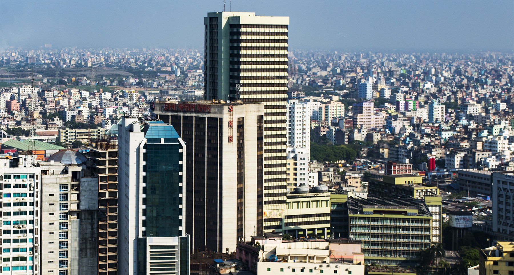 Dhaka